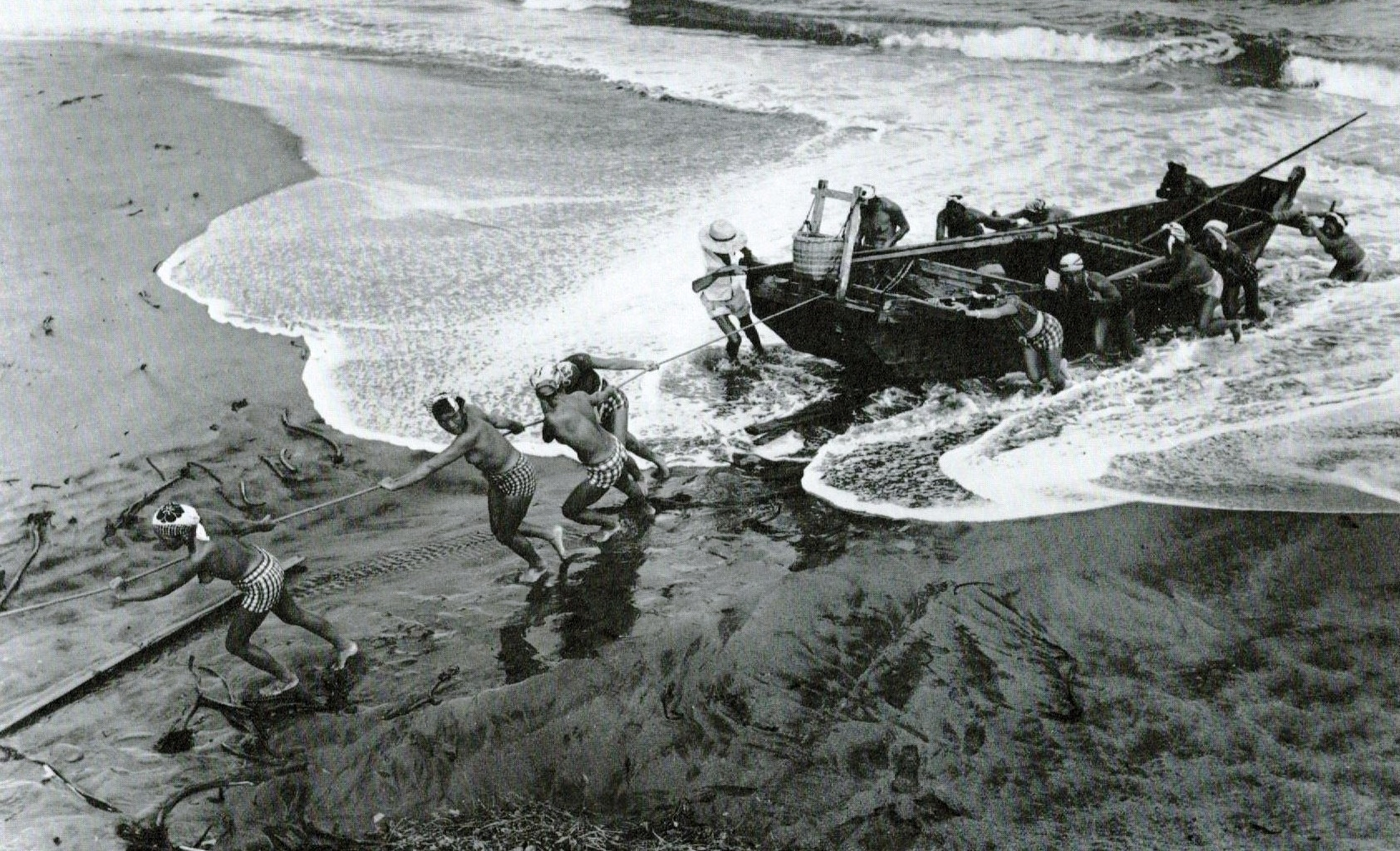 工作中的海女。